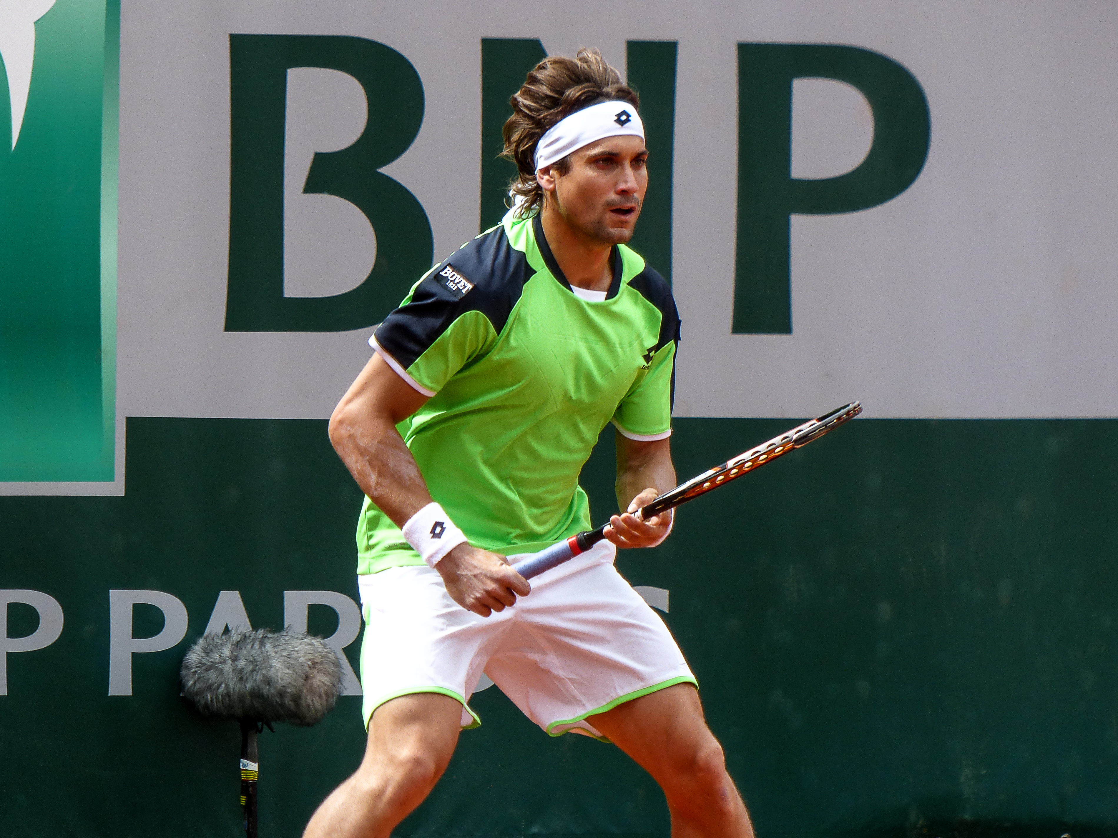 2ème tour Roland Garros 2013 : David Ferrer (ESP) def. Albert Montanes (ESP)